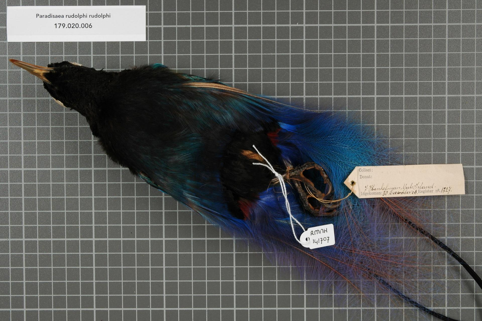 Paradisaea rudolphi rudolphi (Finsch, 1885)